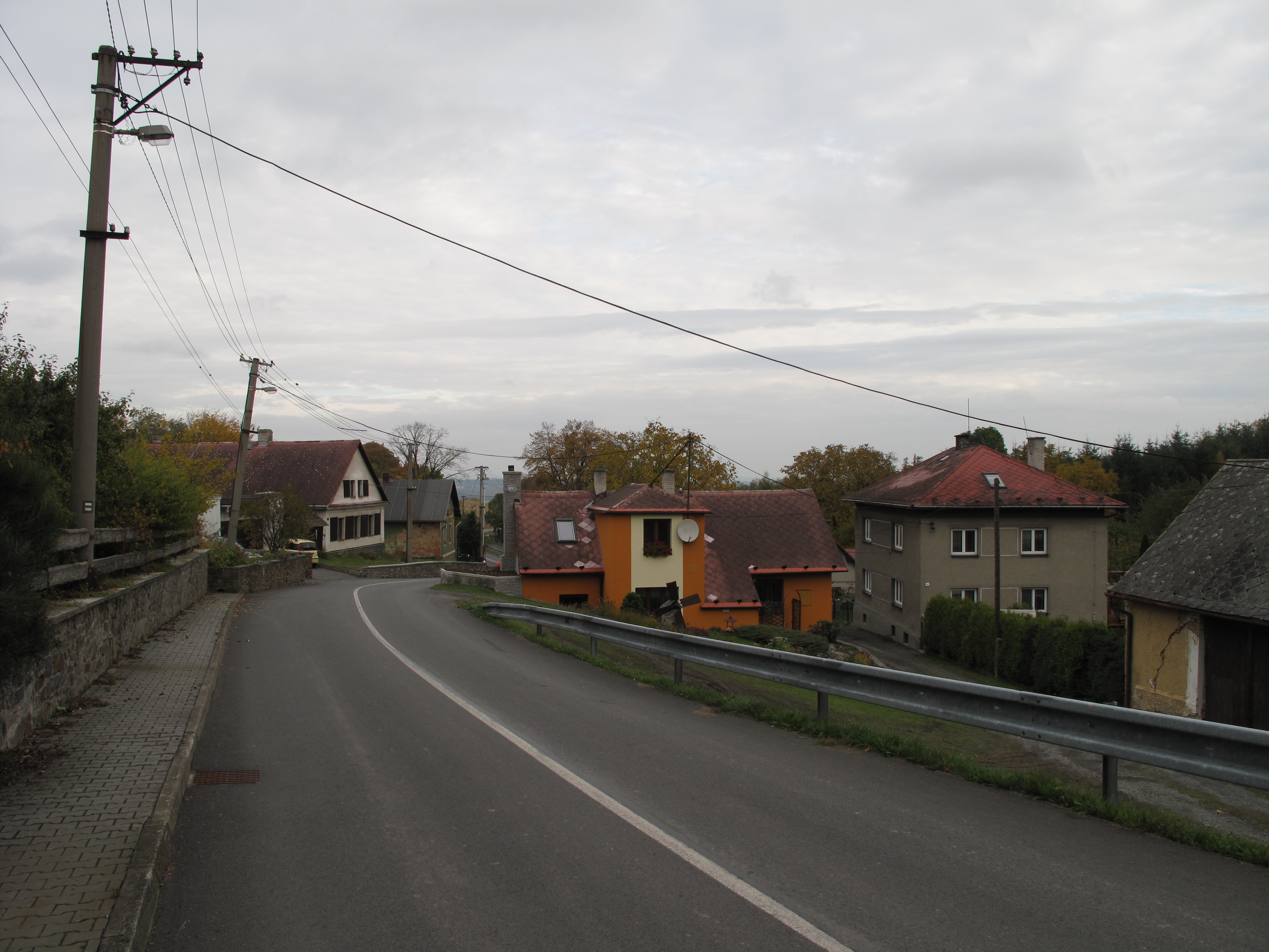 Lhotka u Litultovic. Okres Opava, Česká republika.